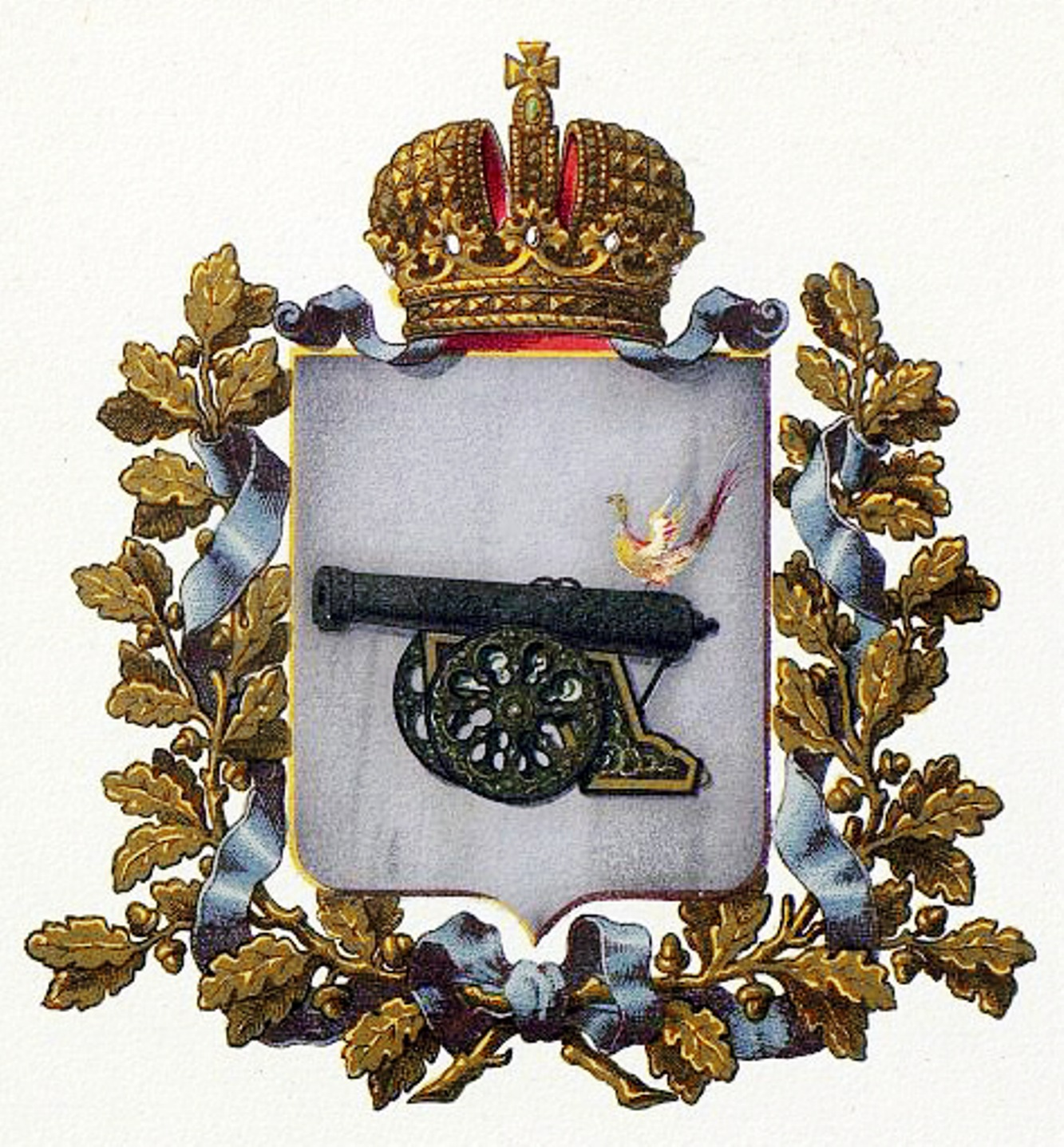 Official Russian Empire coat of arms Smolensk Governorate. Герб Российской Империи Смоленской губернии в Гербовнике МВД. Утверждён Императором Всероссийским Александром Вторым.